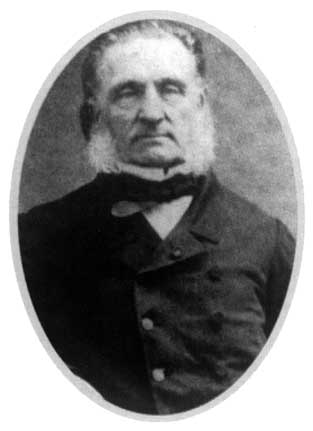 sujet: Armand Trousseau license